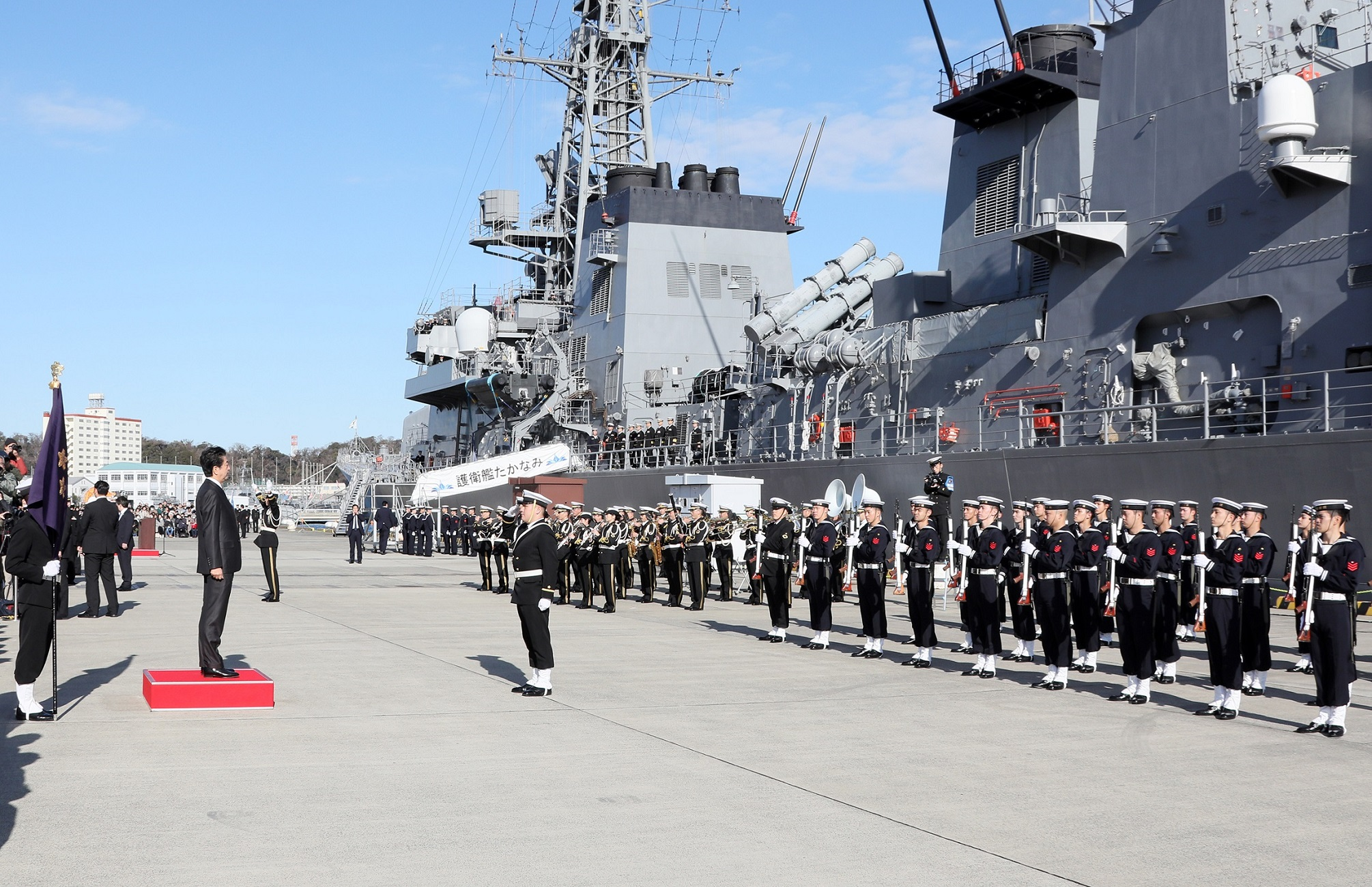 儀じょう隊による栄誉礼及び儀じょう（派遣情報収集活動水上部隊出国行事等）